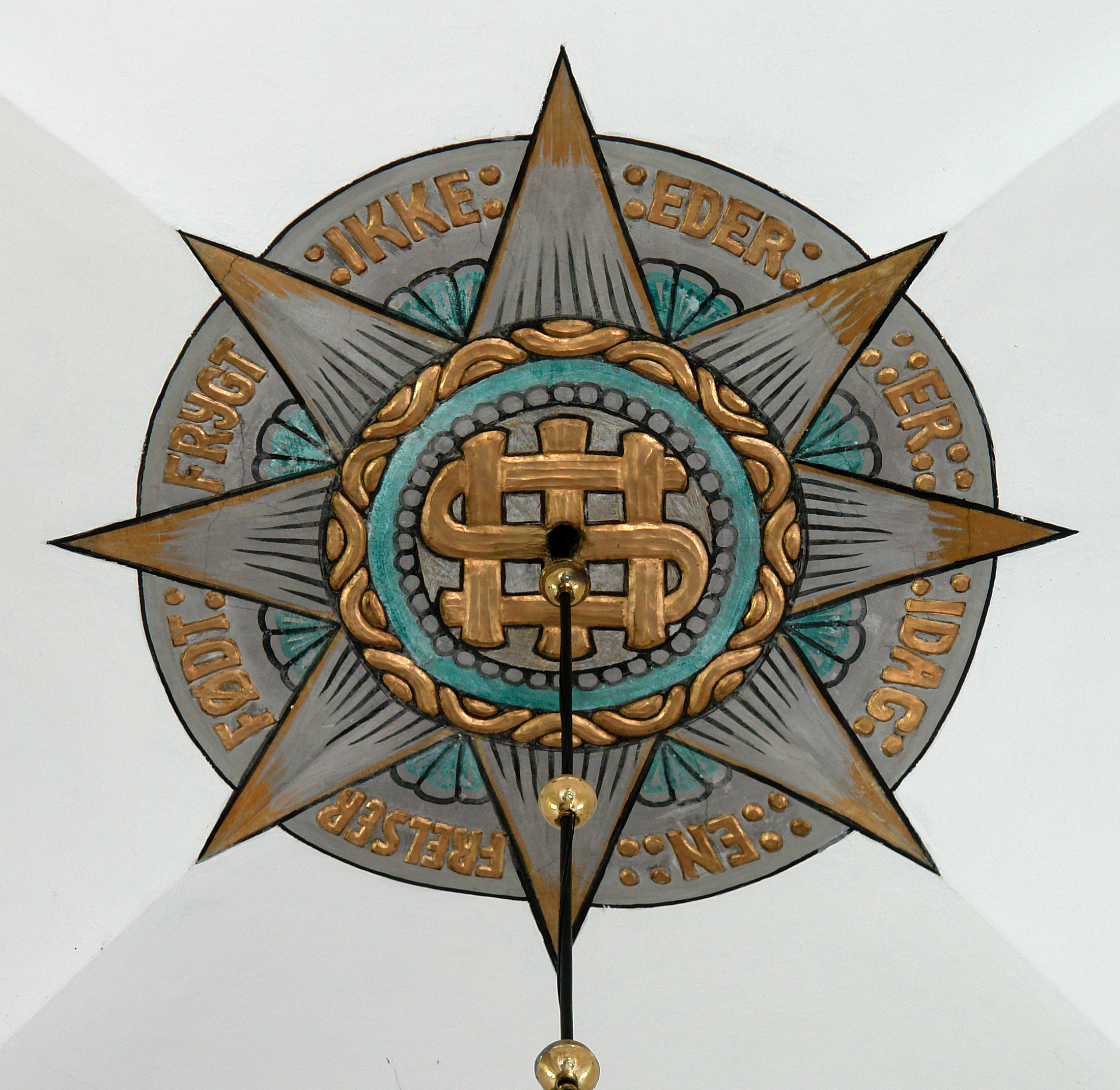 Kirche von Ugerløse, Dänemark (West-Seeland). Christusmonogramm IHS an der Chordecke, ausgeführt 1910 von Jens Møller-Jensen (1869–1948)